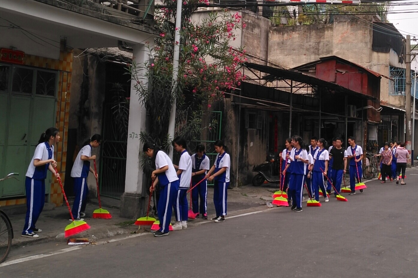 2019年4月29日下午，潮州市南春中学学生在南春路开展义务劳动，平成最后的大扫除。